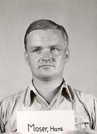 Hans Moser (* 20. November 1907), deutscher SS-Standartenführer der Waffen-SS im Wirtschafts- und Verwaltungshauptamt (Amtsgruppe D - Konzentrationslager)